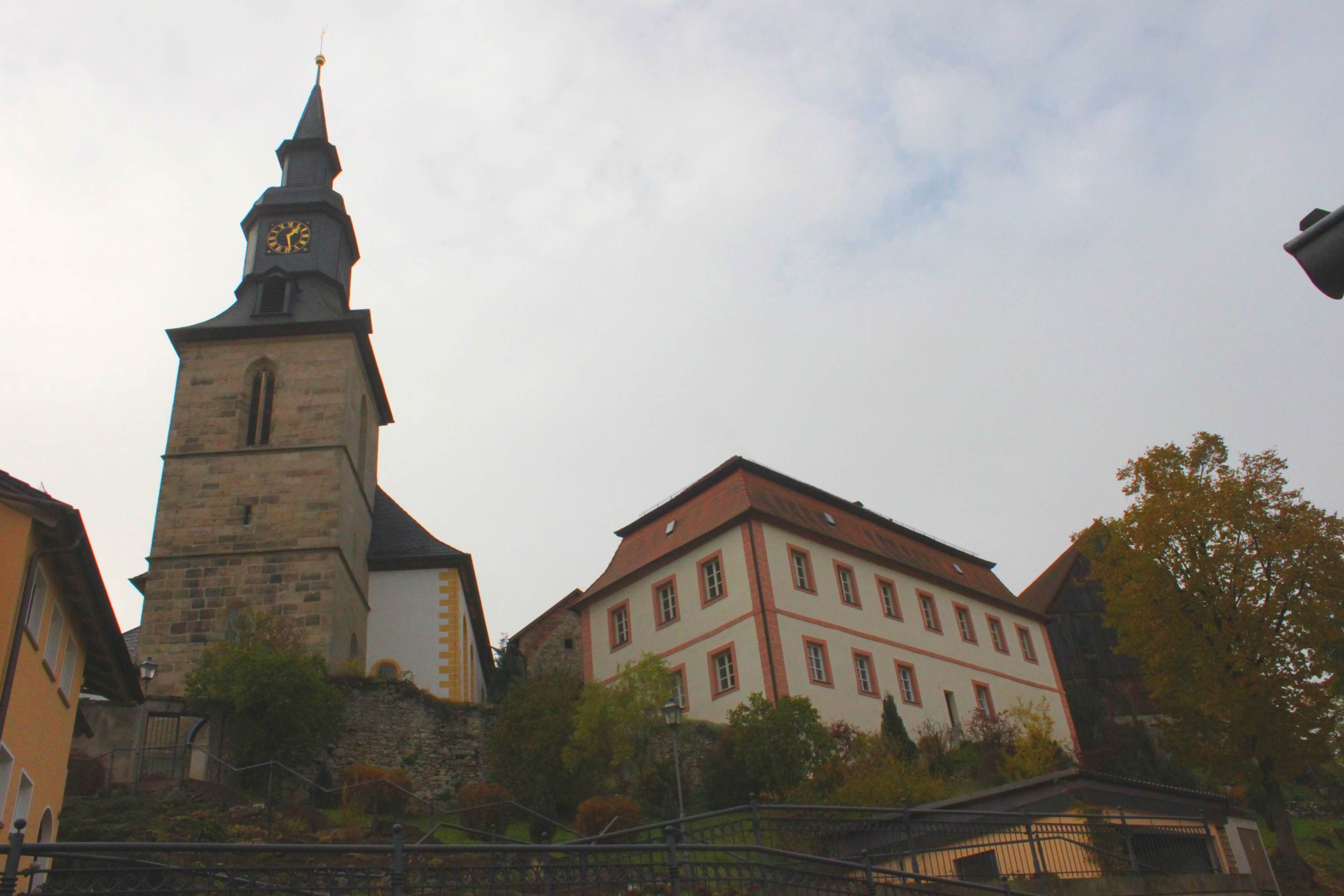 Kirche St. Maria Magdalena von 1776 im Kulmbacher Ortsteil und das emalige Schloss der Freiherren von Guttenberg aus dem Jahr 1740, es steht neben der Kirche, Haus Nr. 34